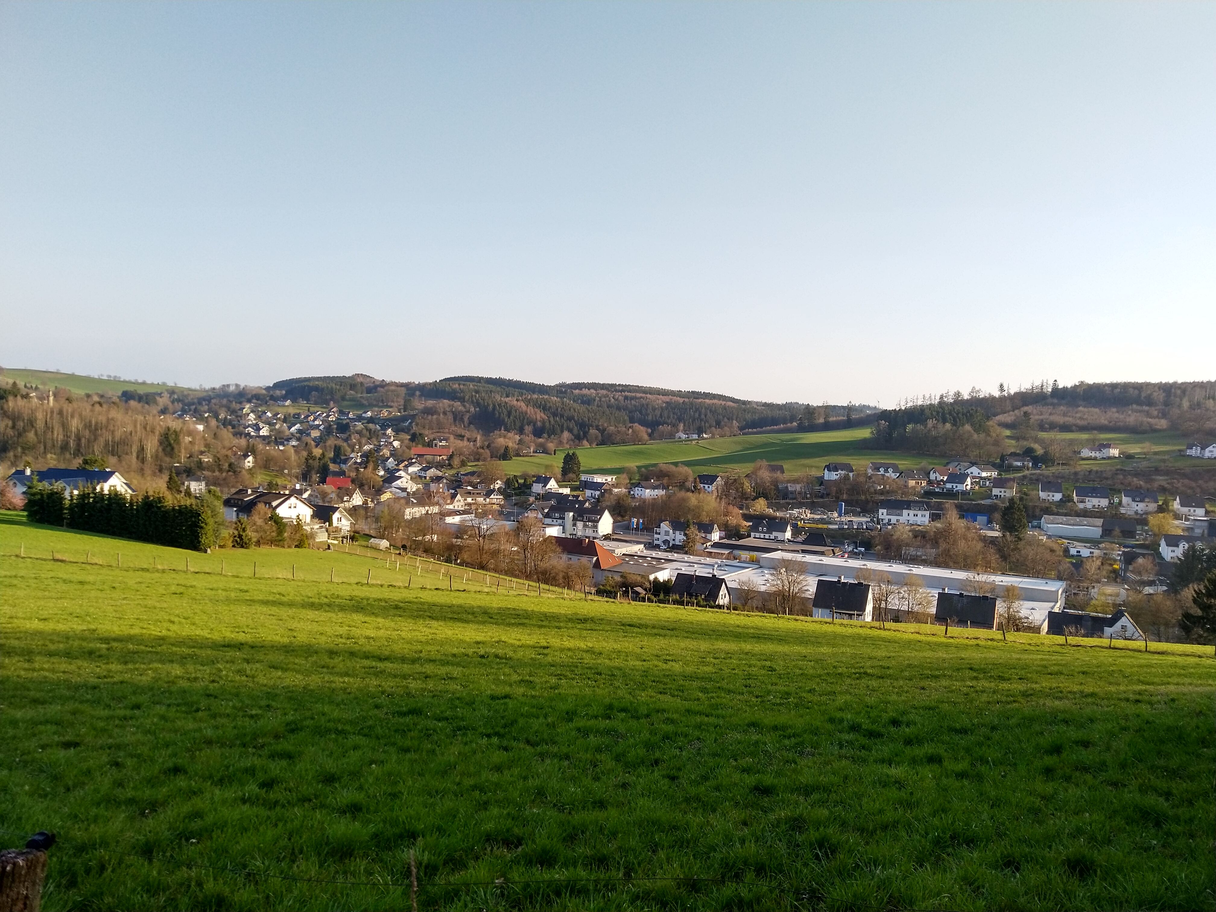 Wildbergerhütte Blick Richtung Südosten